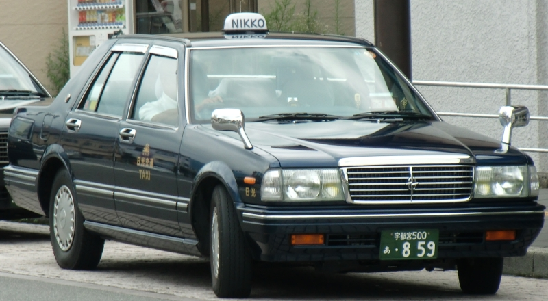 日光交通のセドリック